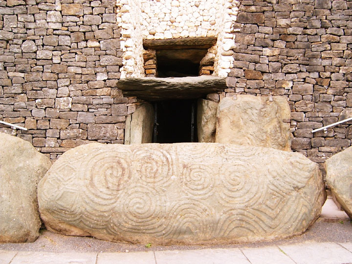 A newgrange-i folyosós sír bejárata (Brú na Bóinne)